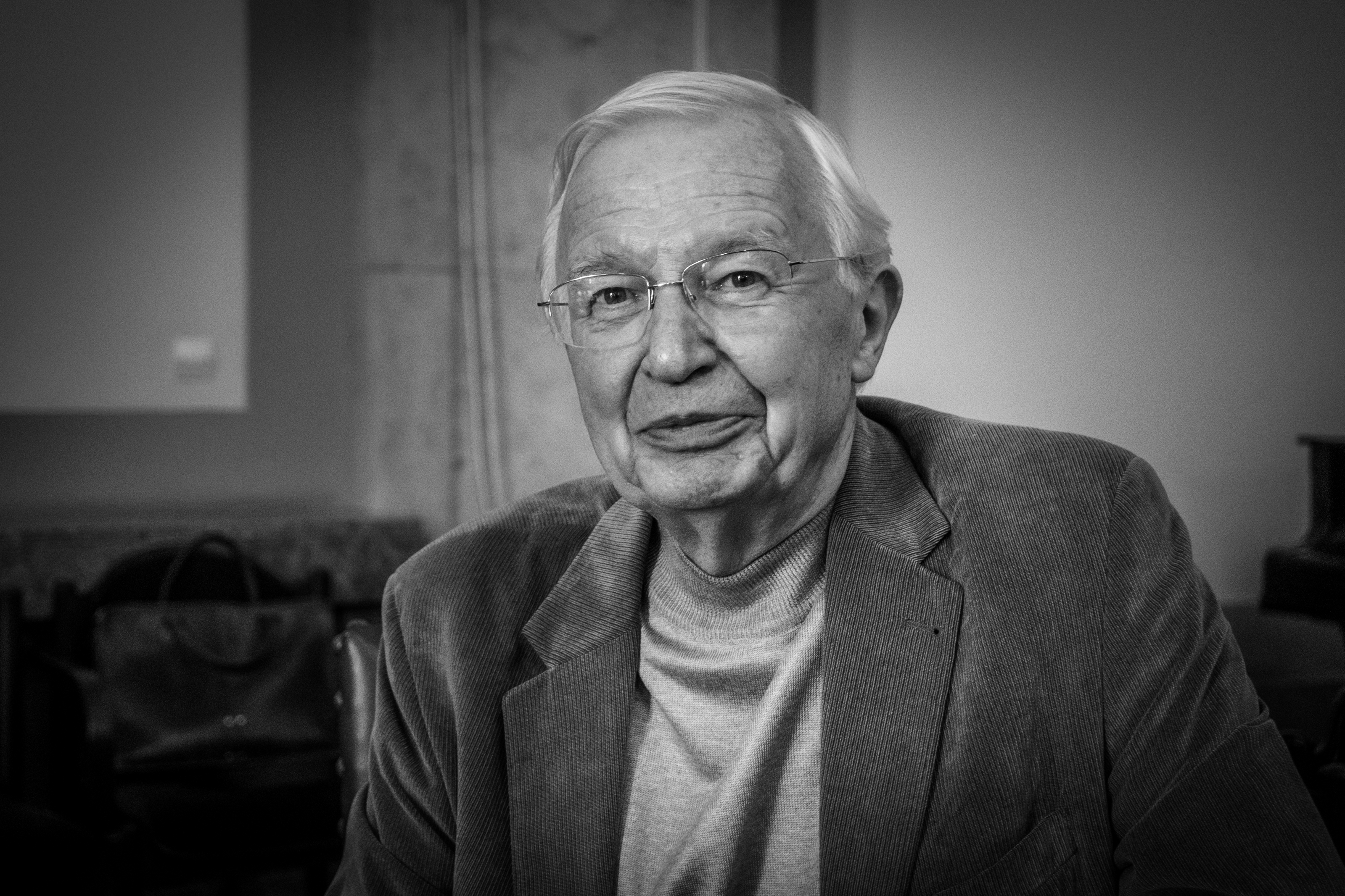 Jean-Marie Lehn par Claude Truong-Ngoc